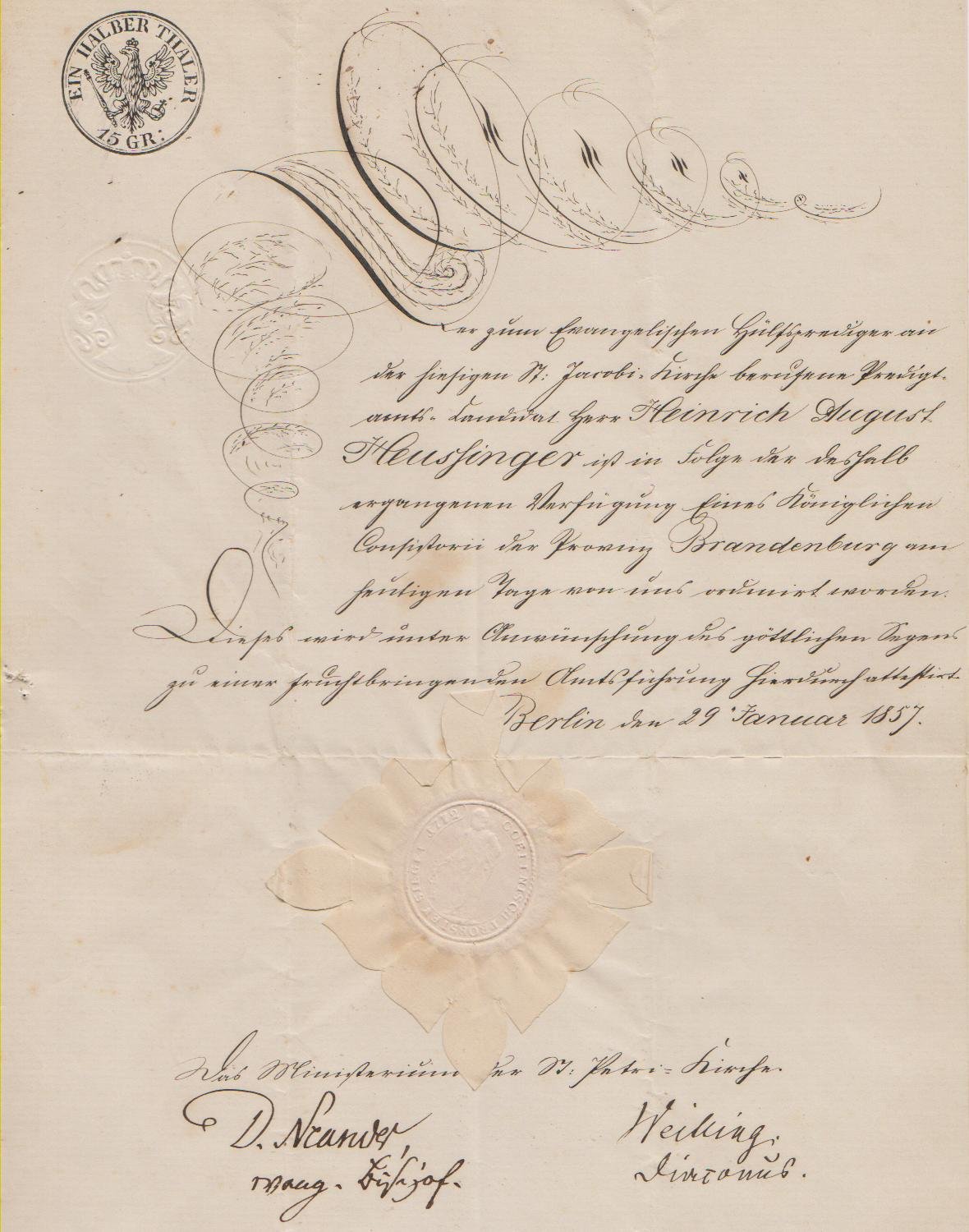 Ordinierung des Prediger Heinrich August Heußinger (1828-1903) durch Bischof Daniel Amadeus Neander in der St. Jacobi-Kirche am 29. Januar 1857 in Berlin.